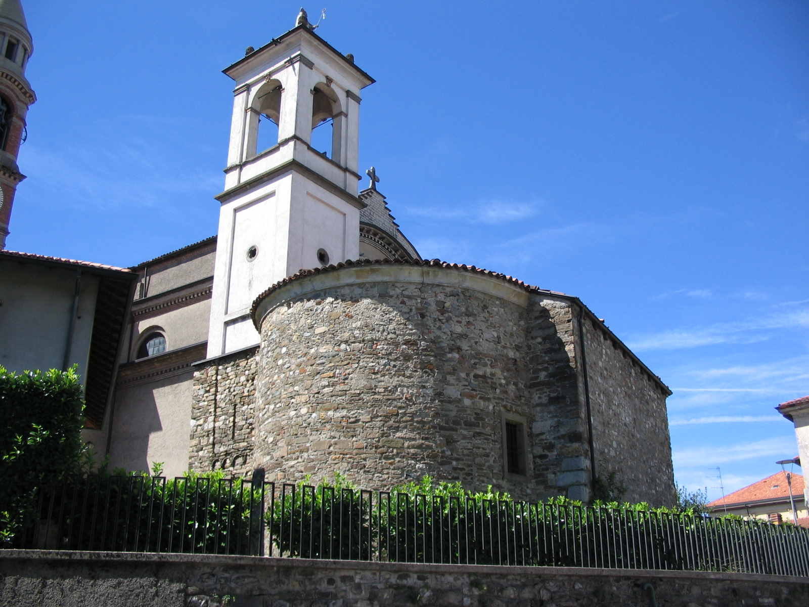 Description=Chiesa di San Zenone di Cisano Bergamasco (XI-XII secolo), sita nel comune di Cisano Bergamasco.